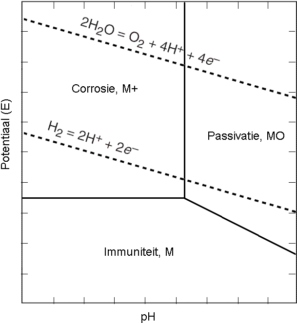 Dit plaatje heb ik zelf getekend (in MS Paint) voor het artikel pourbaixdiagram. Omdat de bestaande pourbaixdiagrammen volgens mij (nog) niet vrij zijn van rechten, heb ik een fictief materiaal genomen en daar een pourbaixdiagram voor getekend. Het diagram komt in grote lijnen overeen met dat van nikkel en magnesium. Oei! Het is goed mogelijk dat de redoxreacties in dit diagram zich niet boven het juiste lijntje bevinden en moeten worden omgedraaid! Ik ga me nog wat beter verdiepen in die dingen en desnoods het plaatje aanpassen. Plaatje is nu in grote lijnen juist: de oxydatiereactie staat bovenaan, de reactie waarbij waterstofgas vrij zou kunnen komen, onderaan. Dit plaatje is gebaseerd op het pourbaixdiagram van magnesium in water. Referentiemateriaal Bovenstaand plaatje is gebaseerd op het potential-pH (Pourbaix) diagram voor het systeem van magnesium in water bij 298 K, met daarin de theoretische corrosiedomeinen, immuniteit en passiviteit, M. Pourbaix, Atlas of Electrochemical Equilibria in Aqueous Solutions, National Association of Corrosion Engineers, 1974, p. 139